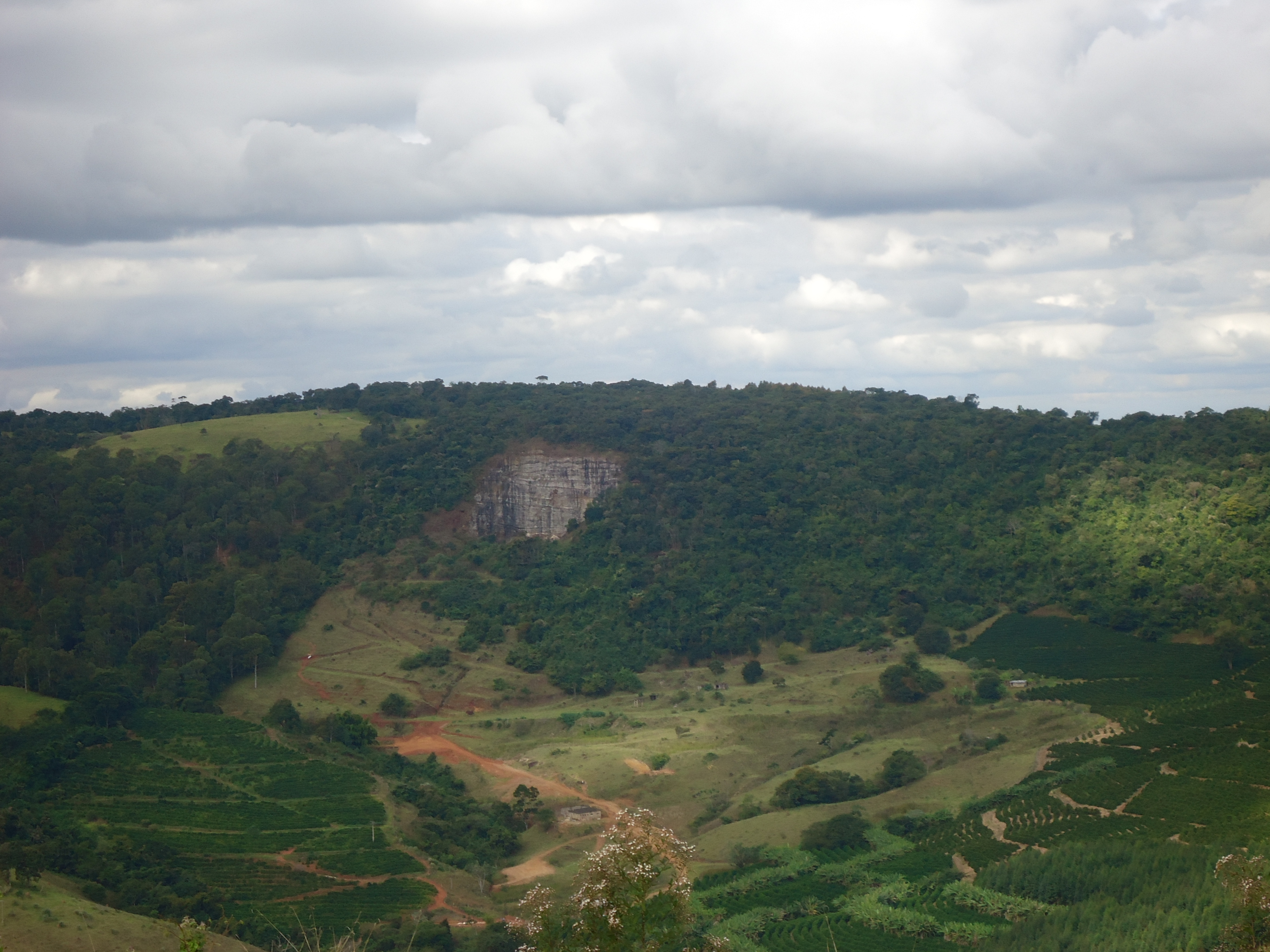 Vista das montanhas ao sul da cidade, onde se pode ver a antiga pedreira e remanescentes da mata atlântica.